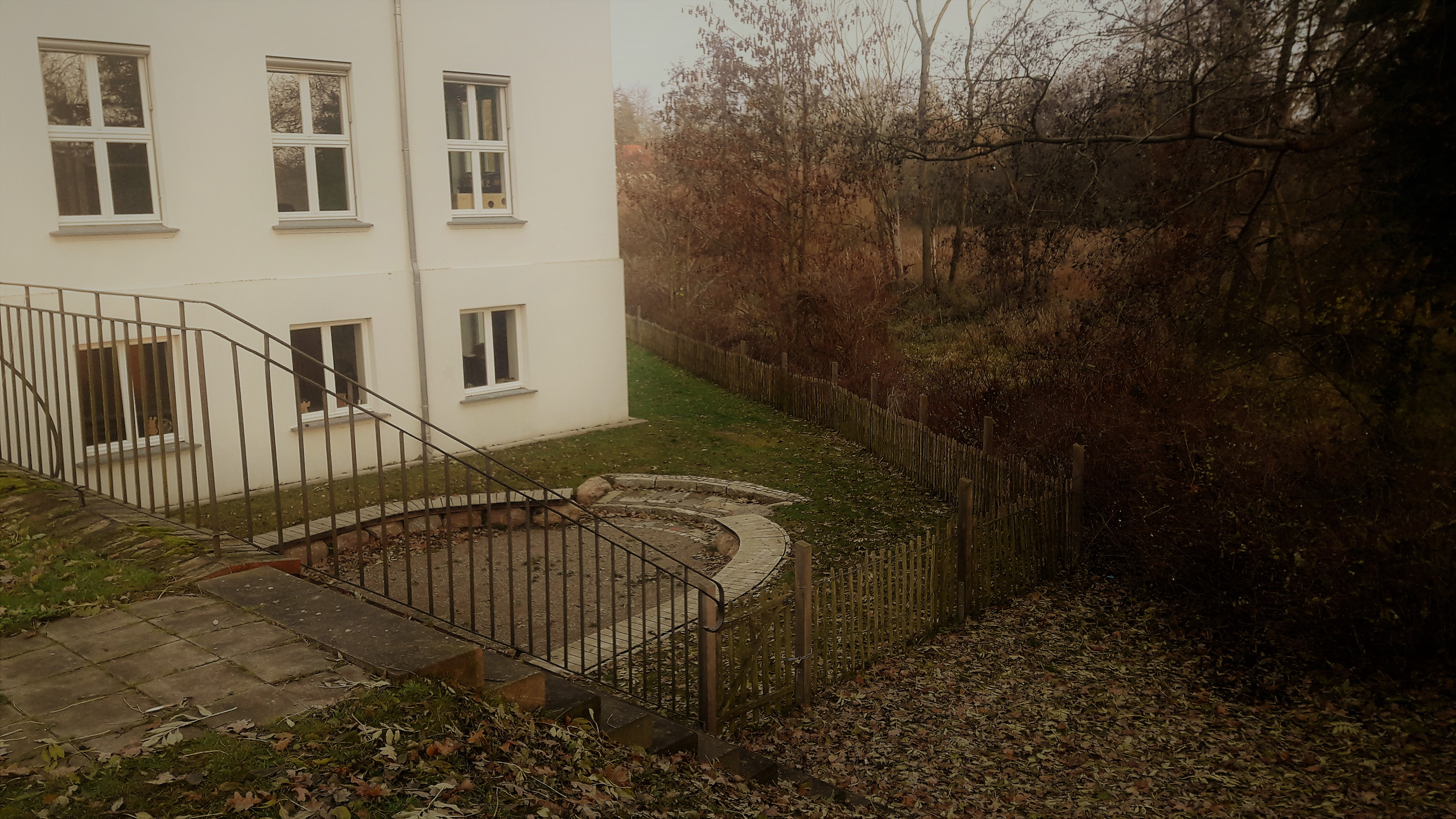 Vaade edelast kunagise piiskopilinnuse peahoone lõunanurga asukohale. Linnuseplatoo kaguserv vastu Maurine jõge oli järsk ja u. 5 m kõrgune.